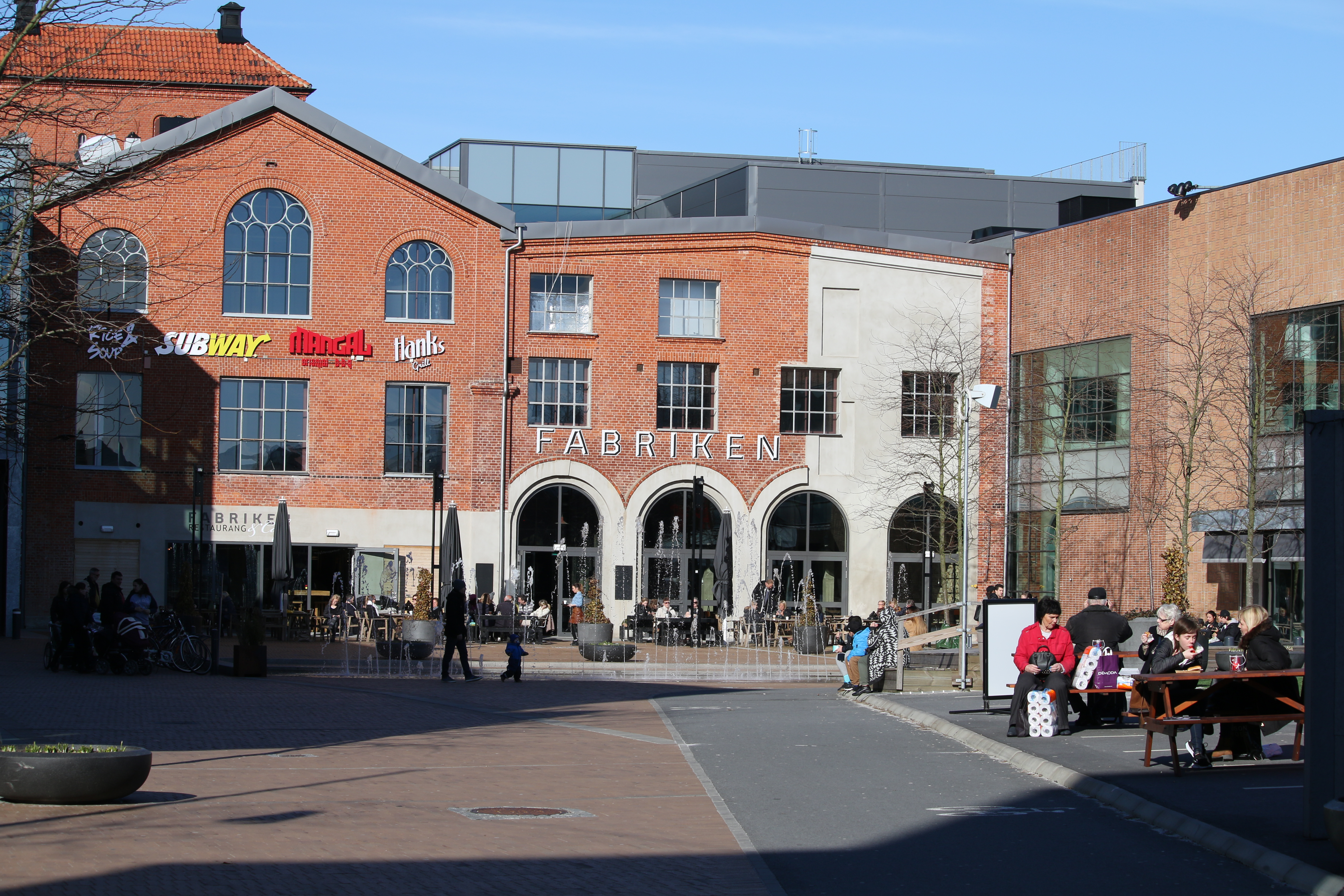 Mobilia, Malmö, mars 2016